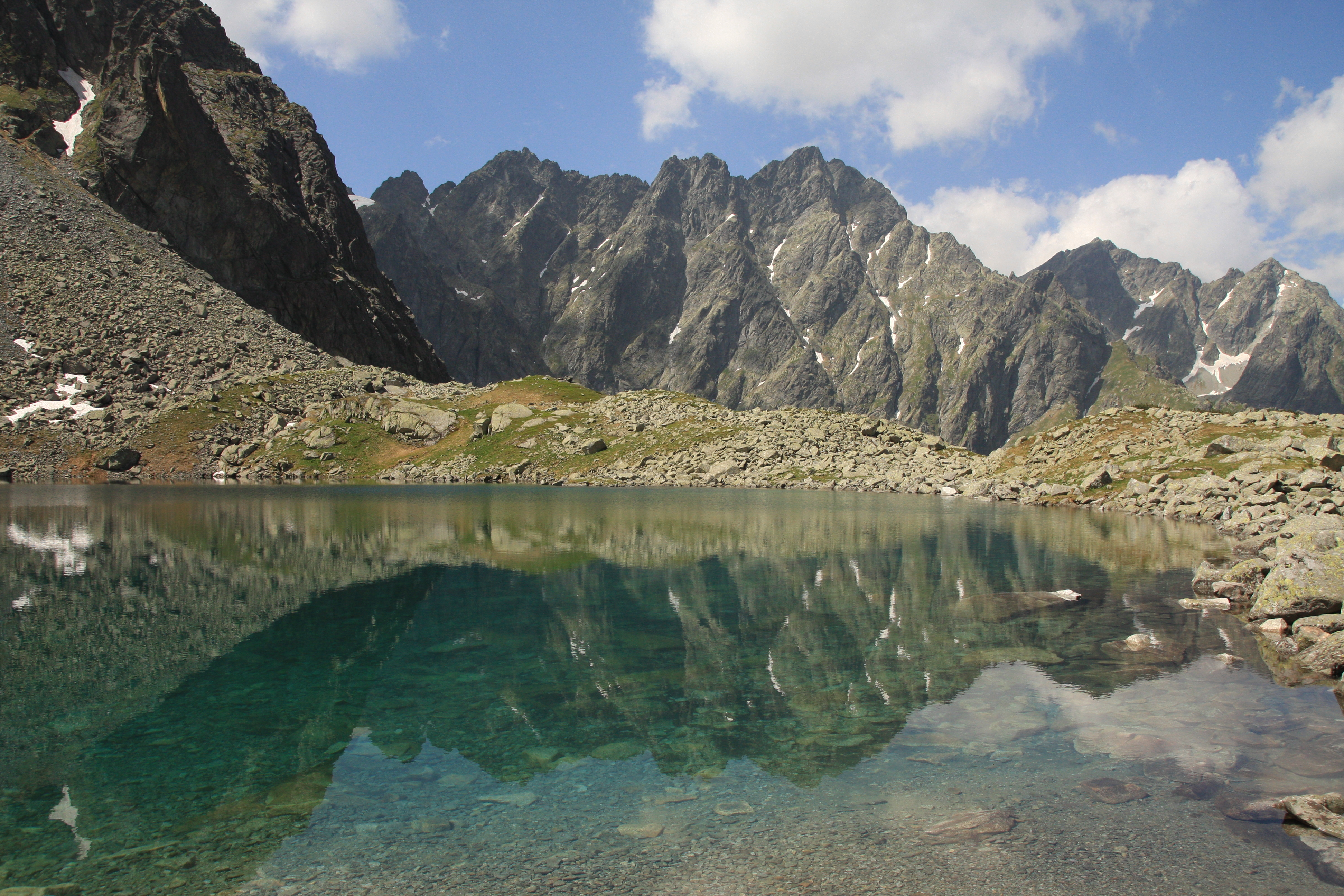 Litworowy Staw. Fot. Tomasz Hens